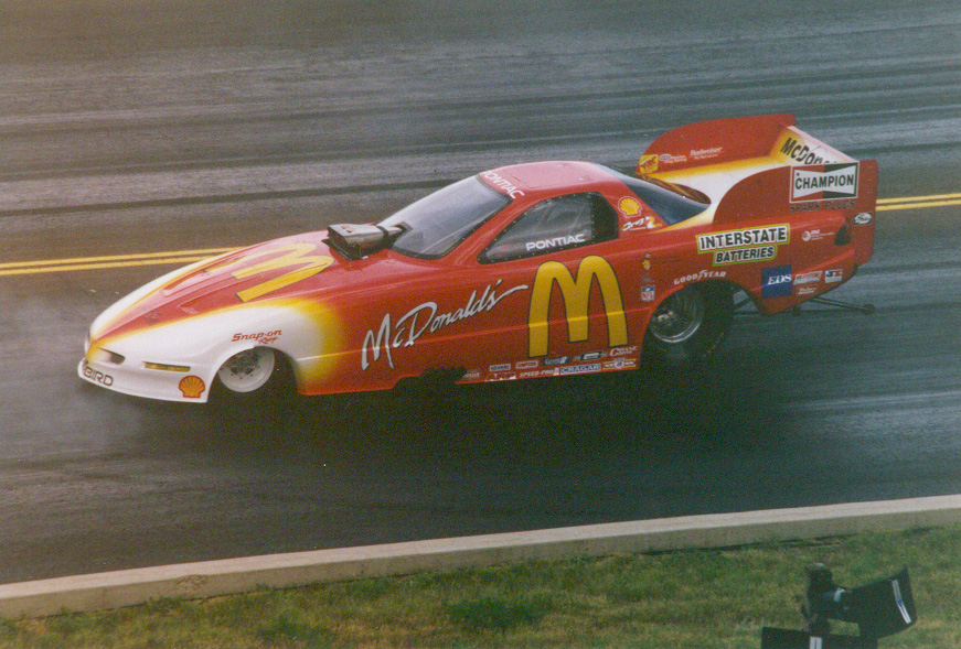 Cruz Pedregon, 1992 NHRA Funny Car champCruz Pedregon